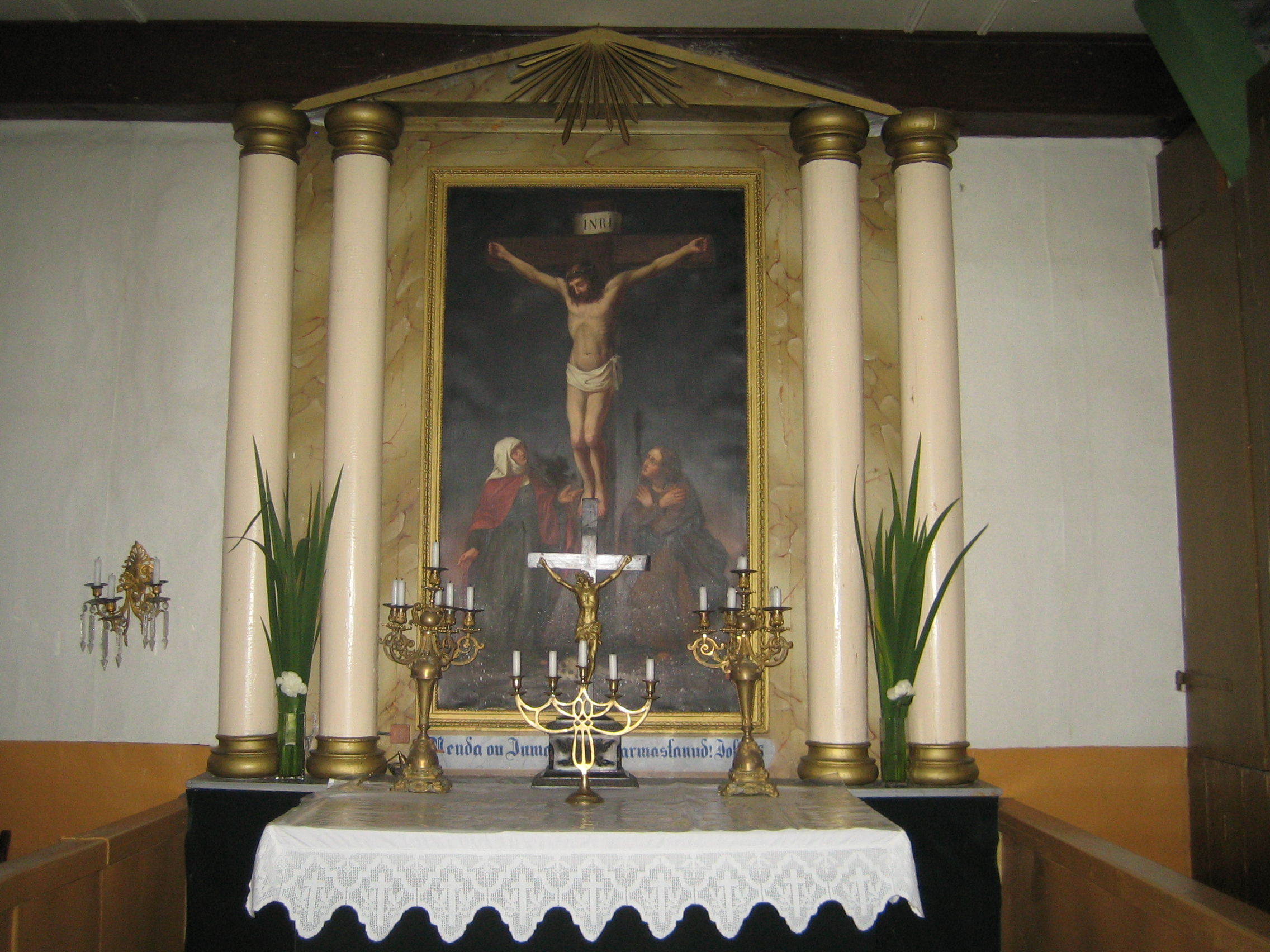 Altarimaal "Kristus ristil", 1893